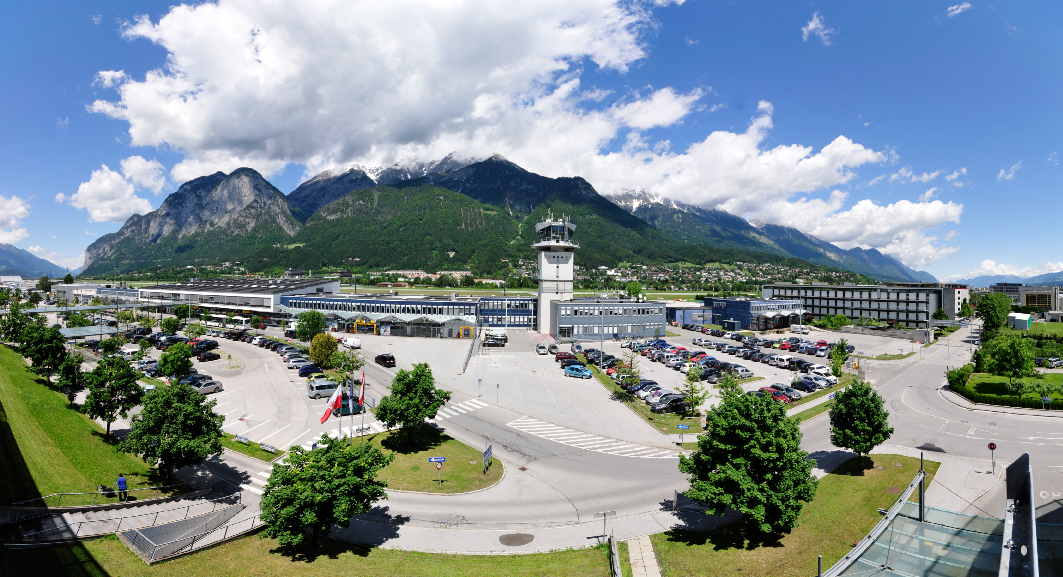 Innsbruck The making of this work was supported by Wikimedia Austria. For other files made with the support of Wikimedia Austria, please see the category Supported by Wikimedia Österreich. Im Rahmen des Fußballländerspiels Österreich gegen Rumänien bin ich einige Stunden durch Innsbruck gefahren und habe Aufnahmen gemacht, die vielleicht mal gebraucht werden könnten. --Ralf Roleček 11:20, 10 June 2012 (UTC) The making of this work was supported by Wikimedia Austria. For other files made with the support of Wikimedia Austria, please see the category Supported by Wikimedia Österreich.